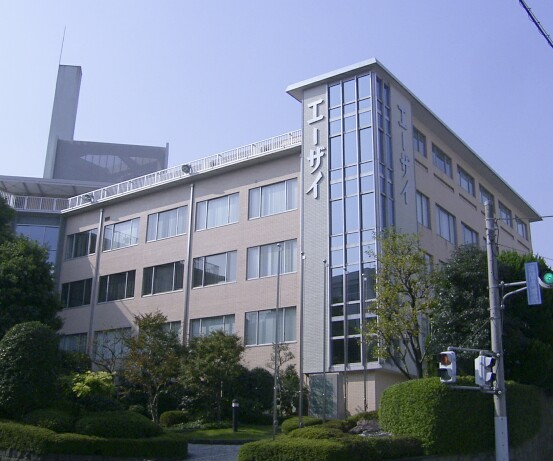 エーザイ本社（東京都文京区） 2006/11/03 KW撮影 Head office of Eisai Co.,Ltd. (Bunkyo-ku, Tokyo, JPN) 03/11/2006 by KW